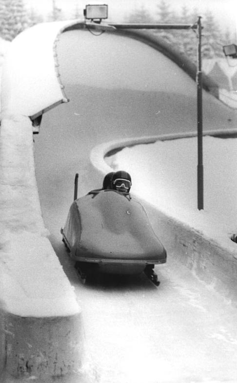 Horst Schönau, Horst Bernhard ADN-ZB Schaar 16.12.74-str-Oberhof: Die Zweierbobbesatzung Horst Schönau-Horst Bernhardt (ASK Oberhof) in der Oberhofer "Eisrinne". Die beiden Armeesportler waren die Besten bei einem Wettkampf der DDR-Zweierbobs am 14.12.74.